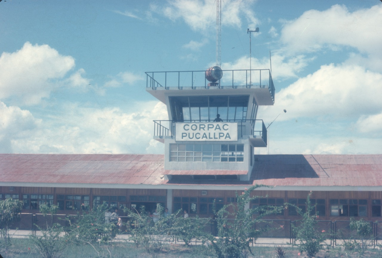 Pucallpa airport